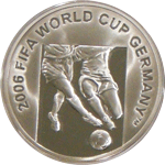 2006-cı ildə Almaniyada keçirilmiş futbol üzrə dünya çempionatına həsr olunmuş 50 manat nominallı gümüş xatirə sikkələrini Polşanın “Polish Mint” sikkəxanasında istehsal edərək tədavülə buraxmışdır.